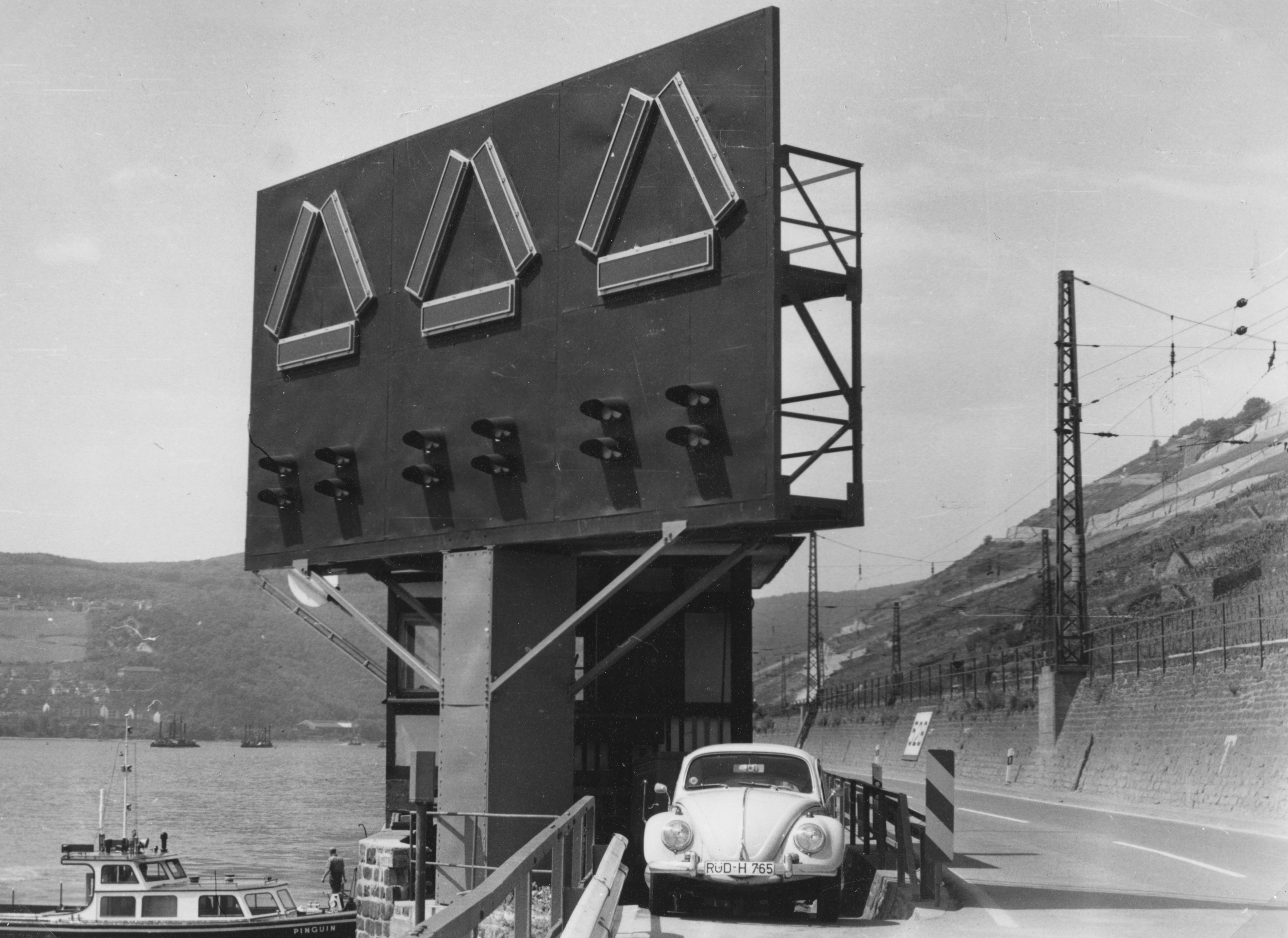 Originaltitel: "Wahrschaustation mit Lichtsignalen am Mittelrhein" Originalbeschreibung: "Nach den Wahrschaustationen mit Flaggen wurde auf der 5 km langen Strecke Oberwesel - Sankt Goar ab 1972 die Schifffahrt mit Lichtsignalen geregelt, die von den Signalstellen Ban(k)eck, Betteck und Ochs(e)nturm bedient wurden (4 Wahrschaubschnitte). Bild: Blick auf das Vorsignal am rechten Ufer gegenüber der Kraus-Aue, Rüdesheim"